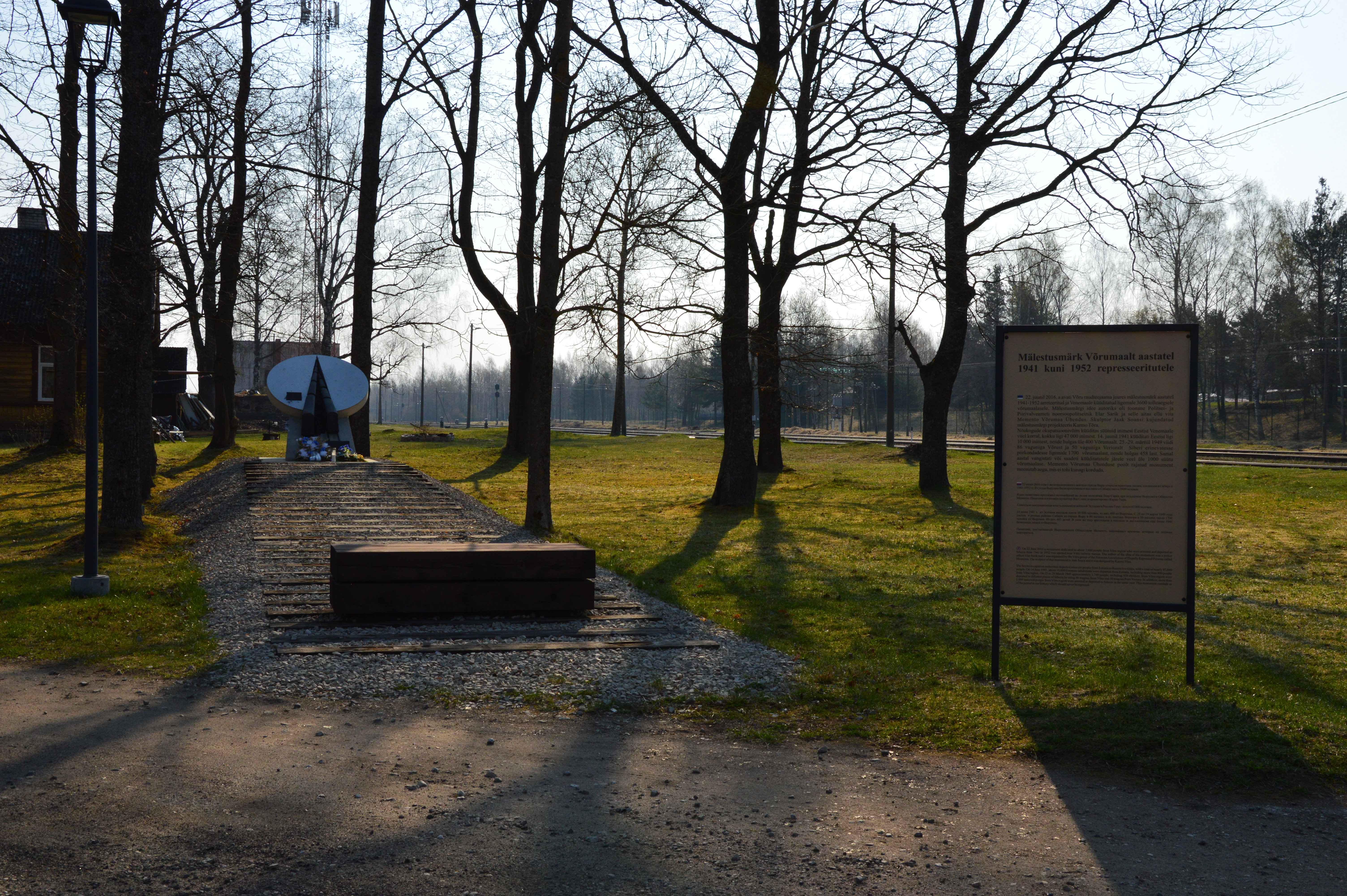 Memoriaal aastatel 1941–1952 Võrus küüditatutele